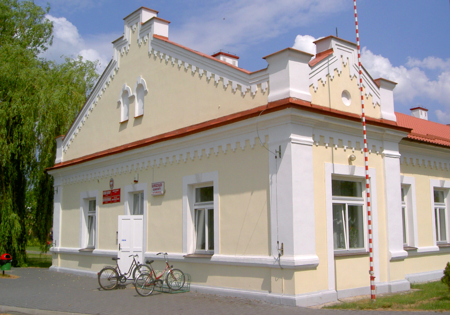 Łukowa, Poland • Urząd Gminy / Commune Council